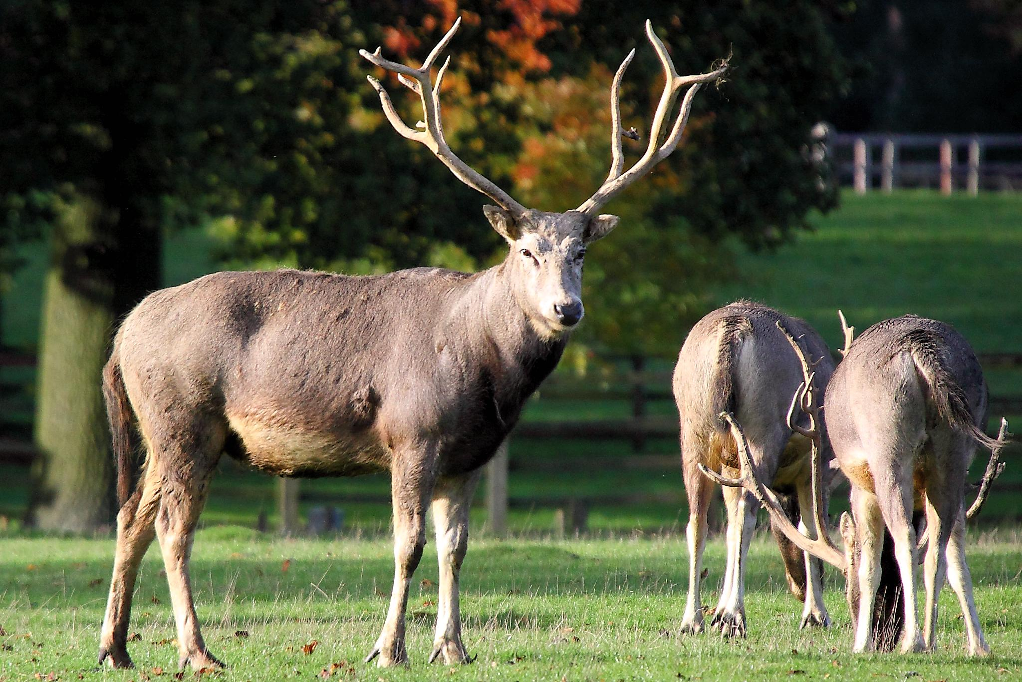 Pere David Deer - Woburn Deer Park